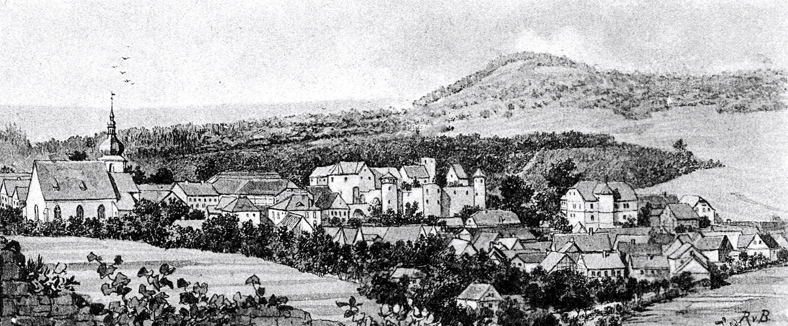 Bibra (Grabfeld) - Ausschnitt einer Bildpostkarte, die vor 1917 erschienen ist.